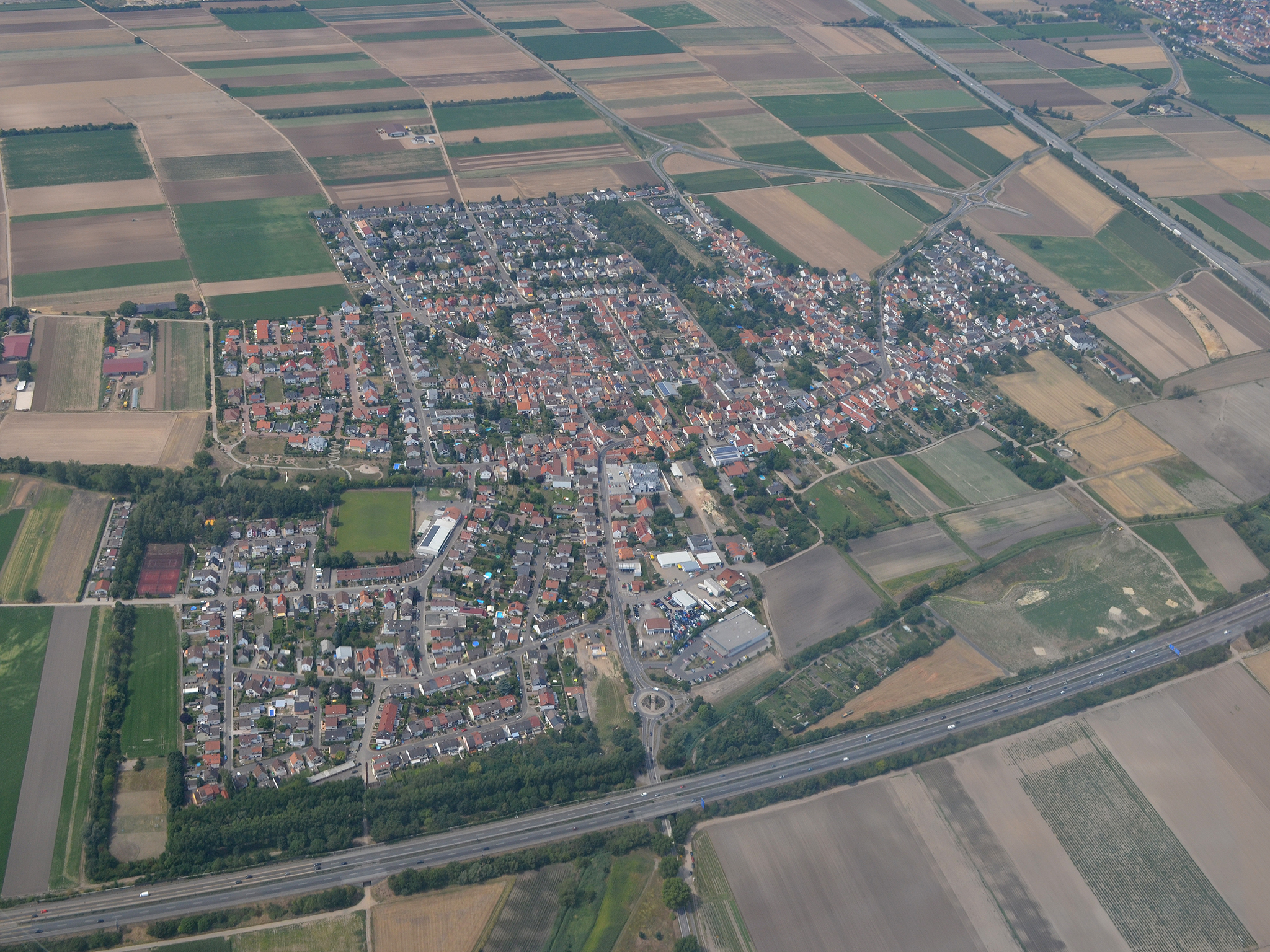 Bild von Heßheim aus der Luft